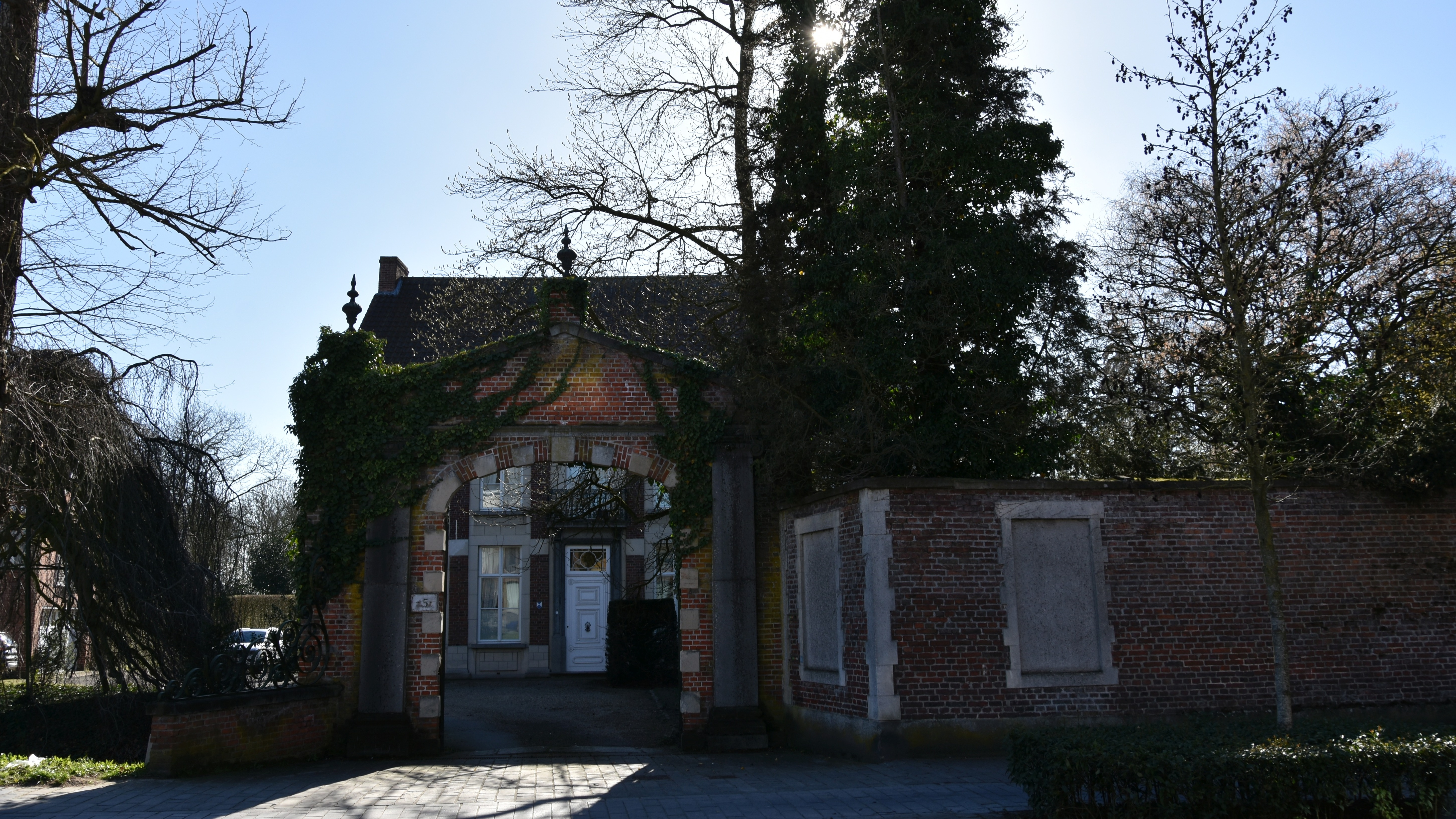 Waarschoot Kasteeldomein De Schepper erfgoed 33294 24-03-2019 15-50-01